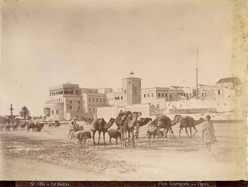 Le palais du Bardo (avant 1900) Bertrand Bouret